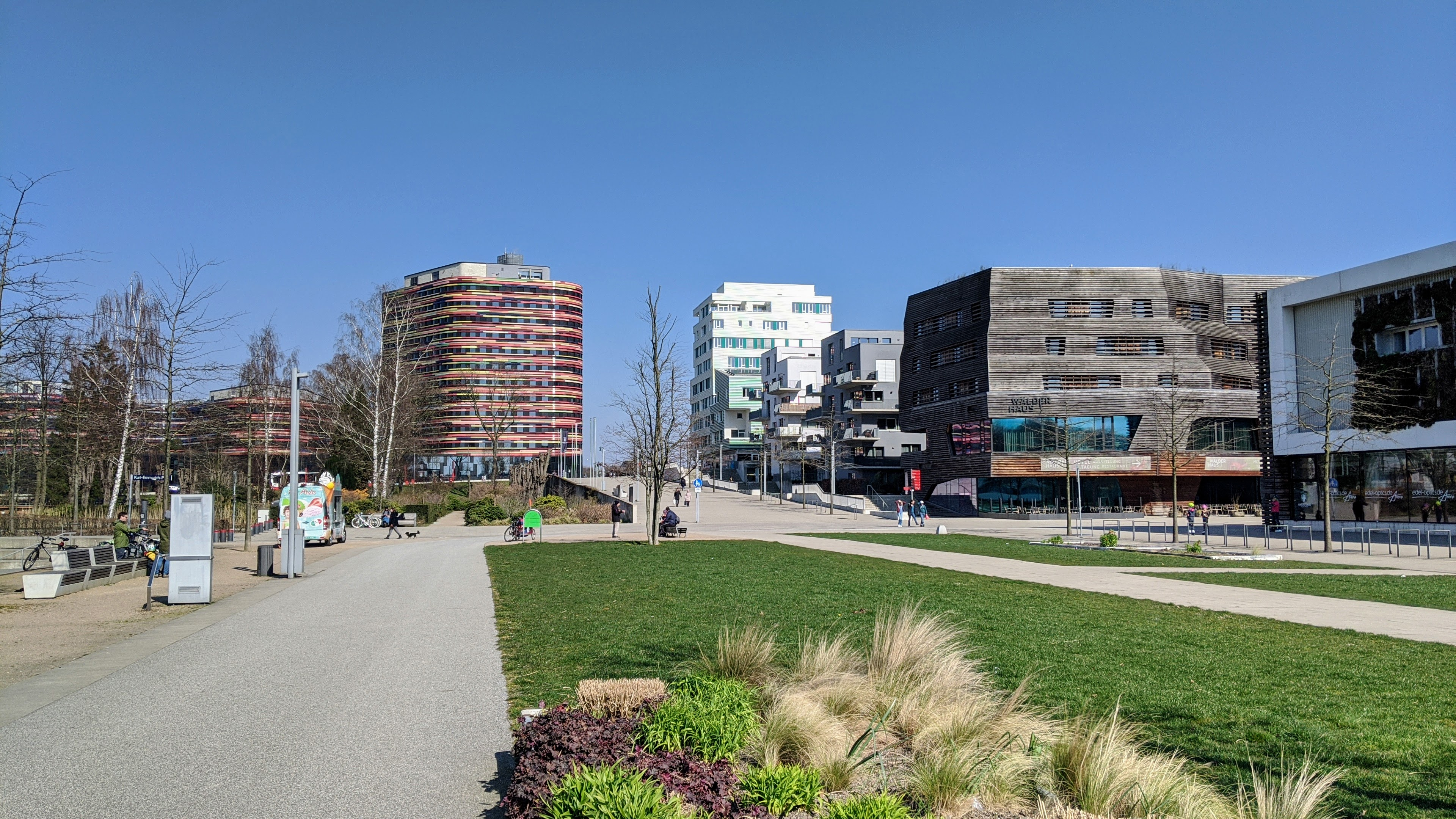 Hamburg-Wilhelmsburg, IBA Bauten in der "Neuen Mitte", im Hintergrund die Stadtentwicklungsbehörde